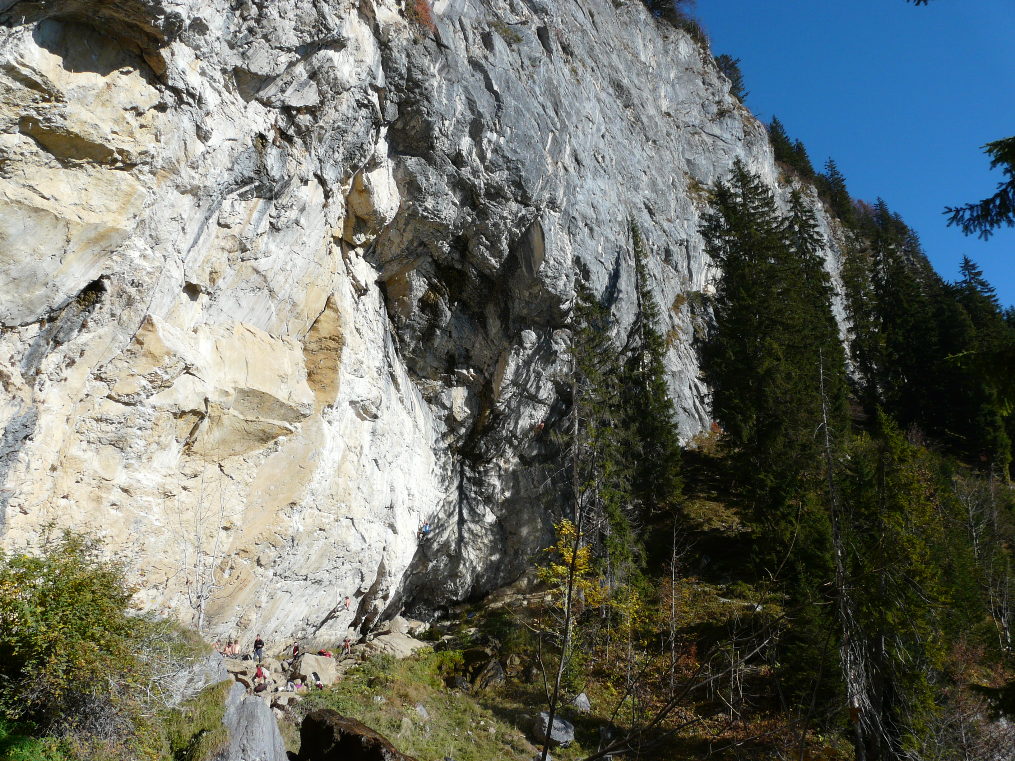 Klettern am (ausnahmsweise wasserlosen) Schleierwasserfall im Kaisergebirge